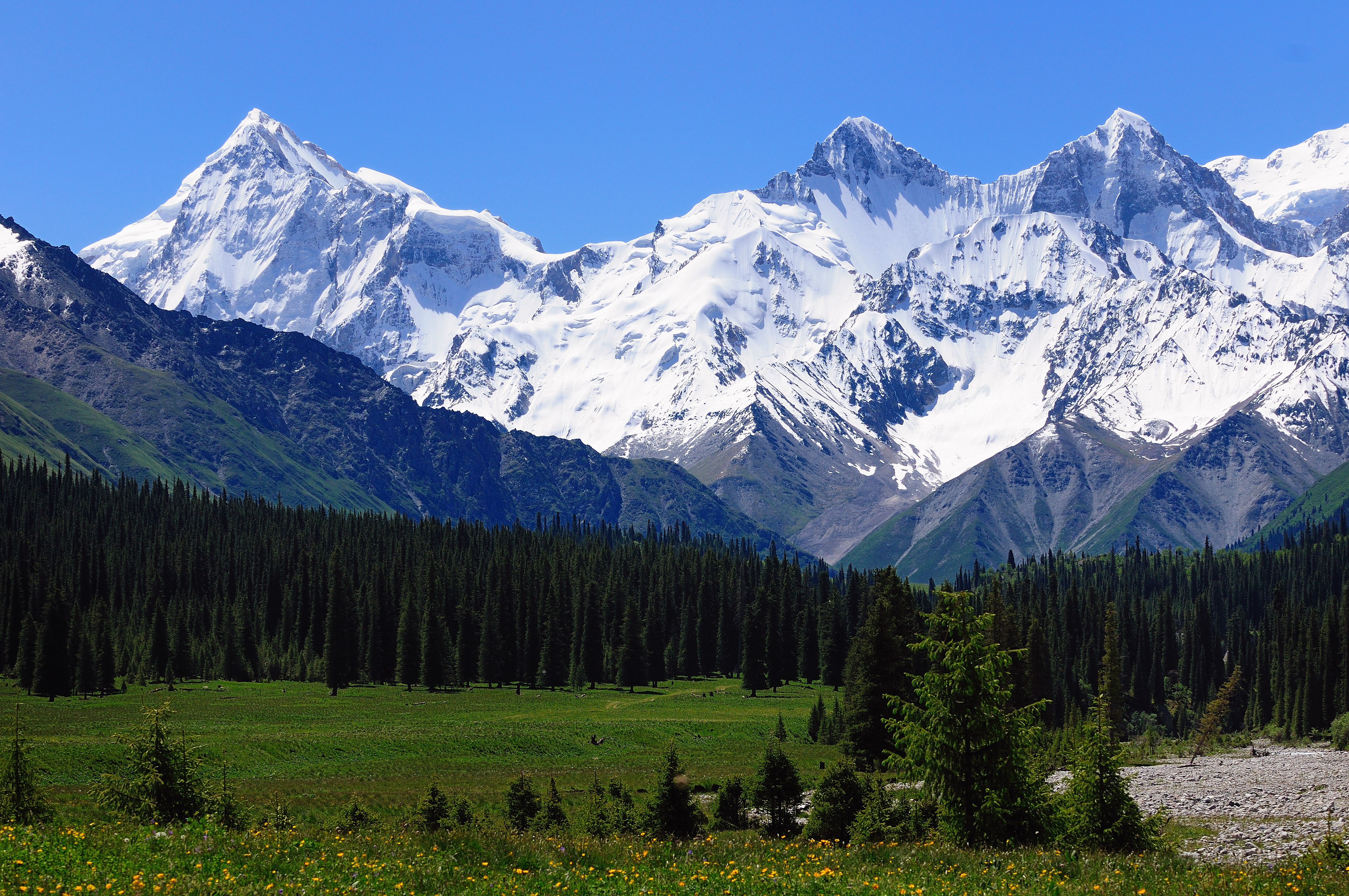 夏塔大峡谷，木扎尔特冰川